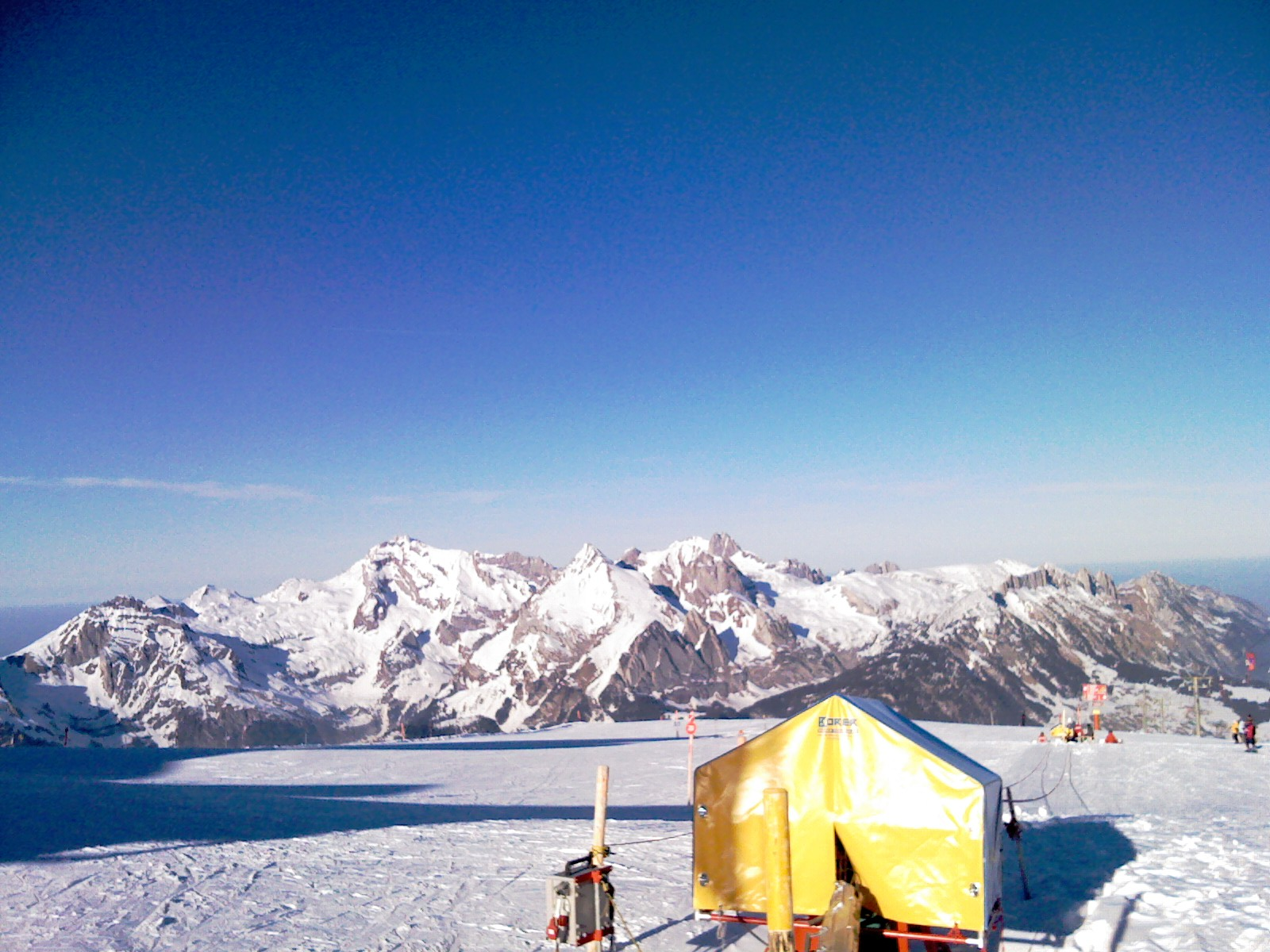 Säntis massif seen from Chäserrugg - Säntis-masivo vidita de Chäserrugg